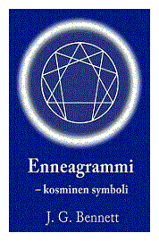 Karatas-Seuran julkaisu: Enneagrammi - kosminen symboli